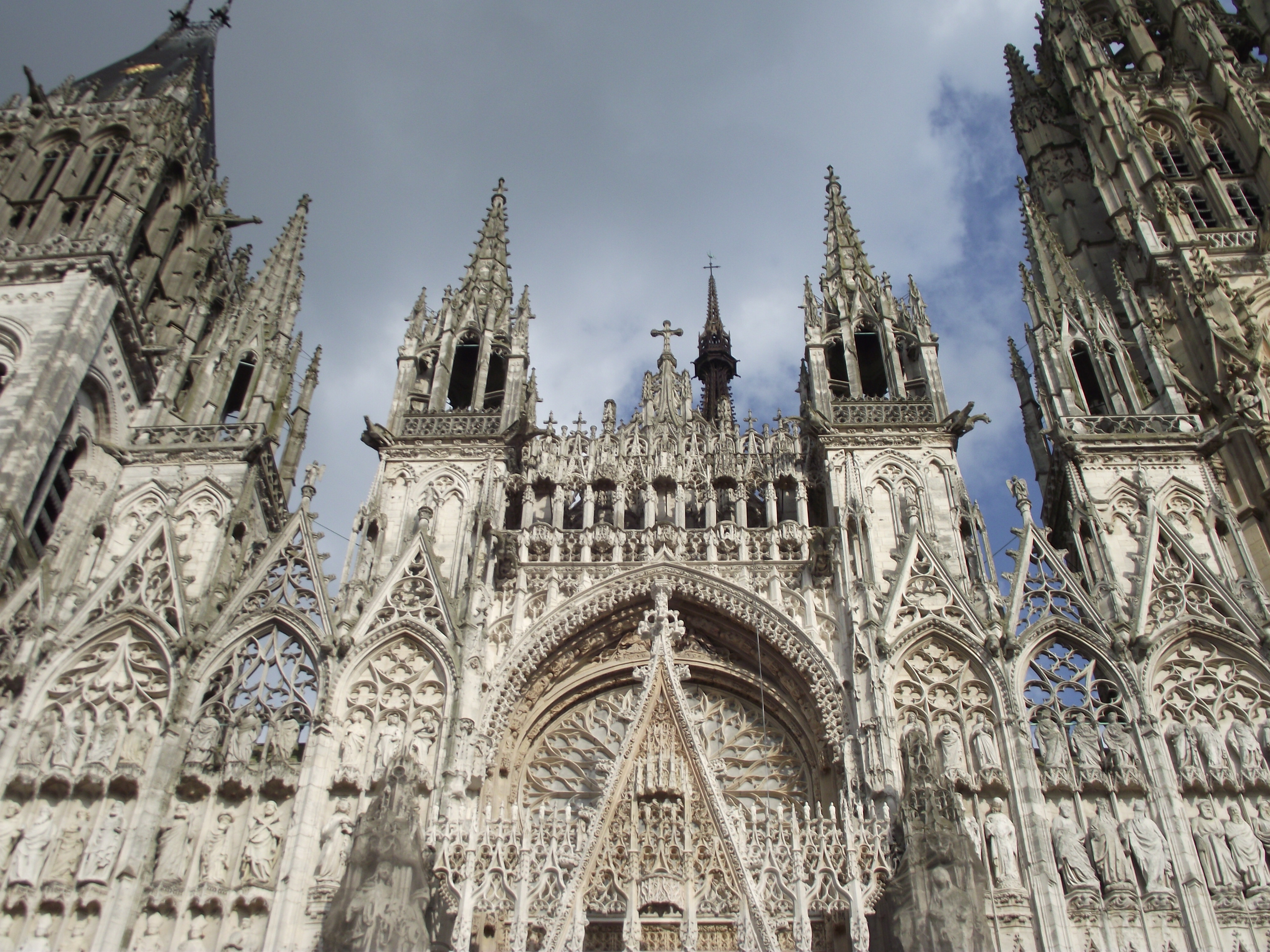 Façade occidentale de la cathédrale de Rouen